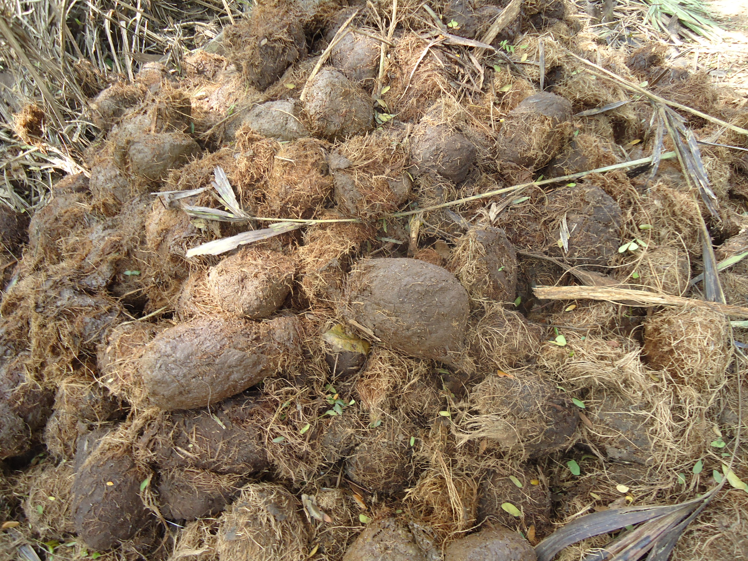 Elephant Dung